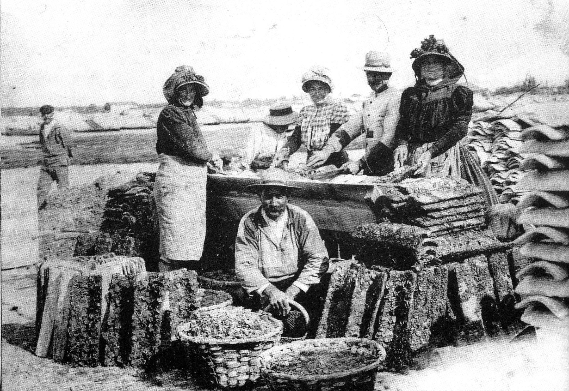 Les débuts de l'ostréiculture sur le Bassin d'Arcachon (Pays de Buch) à la fin du XIXe siècle Copyright Catégorie: Pays de Buch